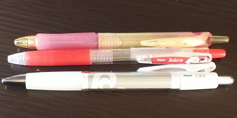 PILOTのボールペン（アクロボール・ジュース・オプト）